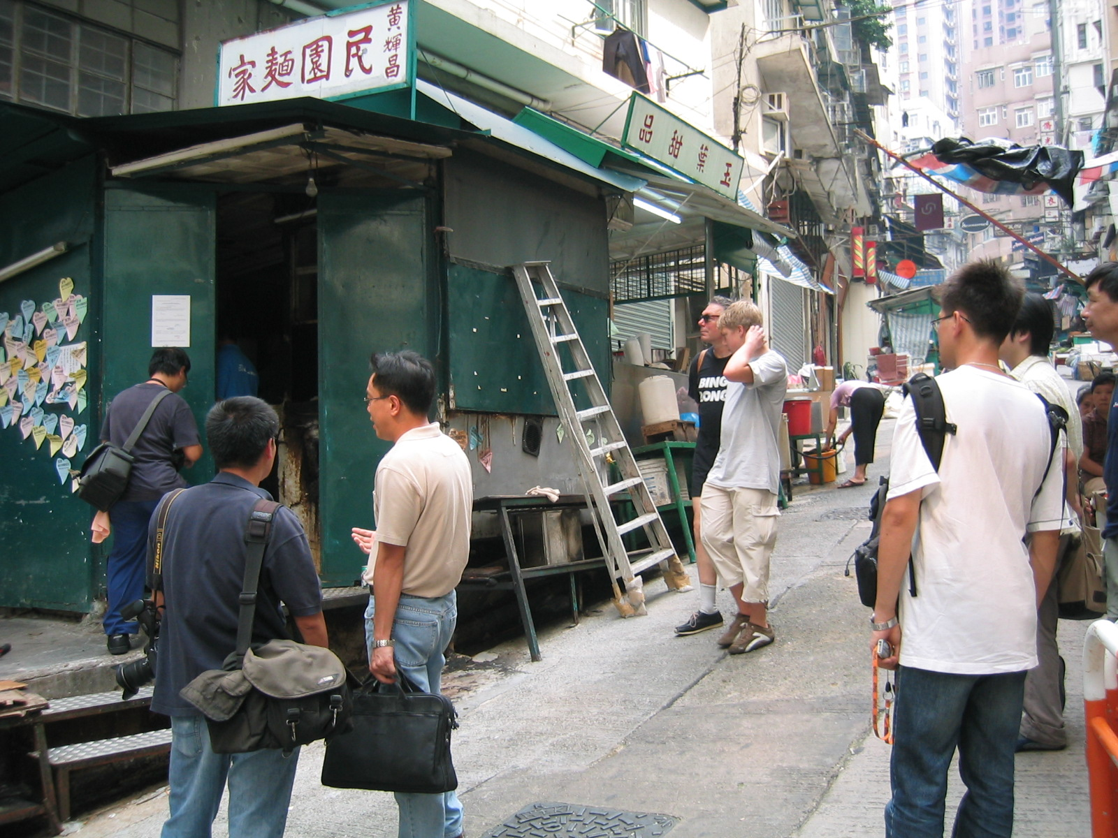 Elgin Street, Central, Hong Kong